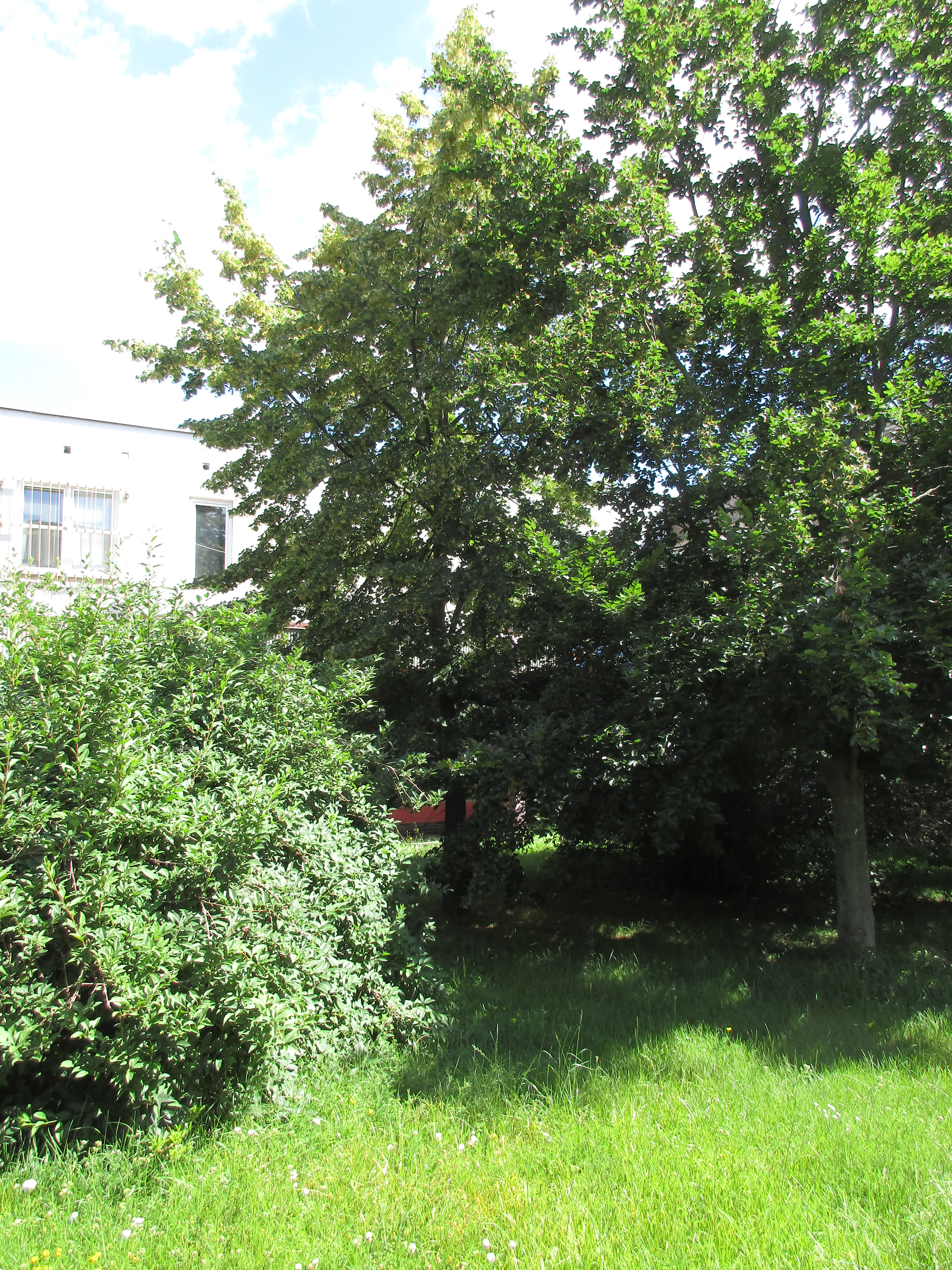 Lípa malolistá (Tilia cordata). Praha 6 - Zličín, Nedašovská. Vysazena 27. října 1998 na památku 80. výročí vzniku Československé republiky. Významný strom, evidenční číslo MHMP: 48, v databázi od roku 2014.